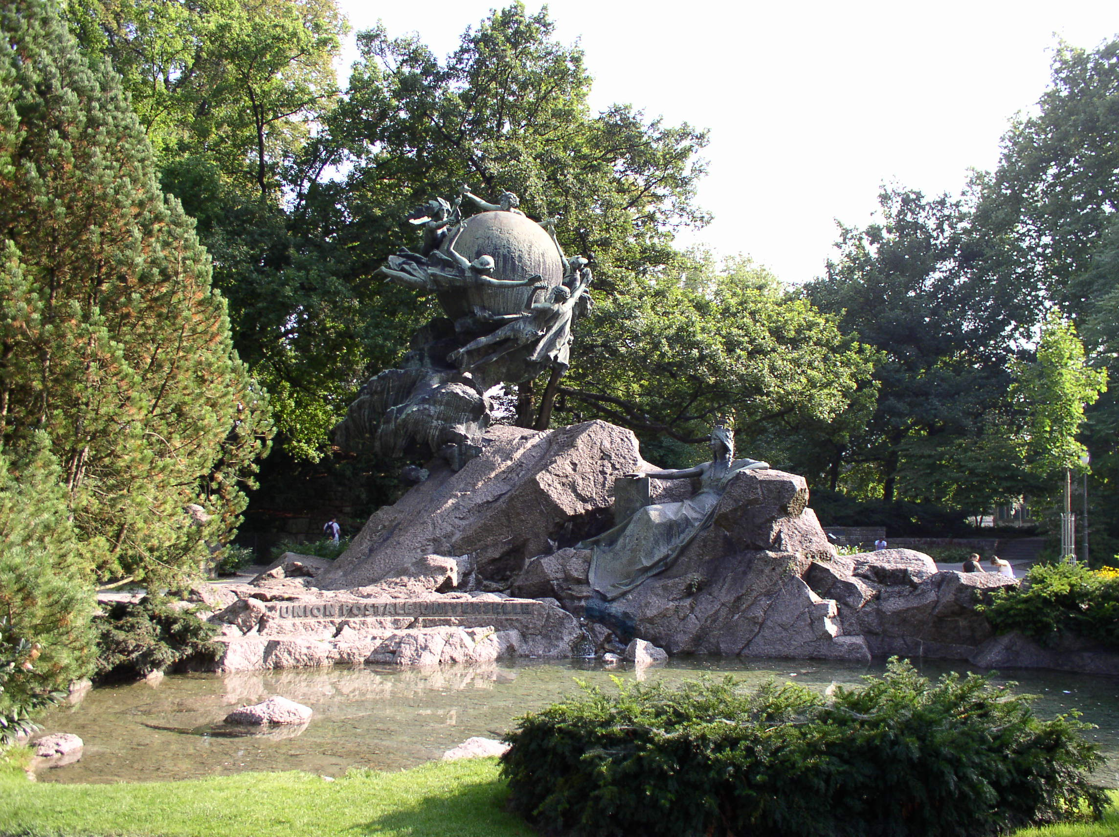 Description: Weltpostdenkmal an der Kleinen Schanze in Bern. Bildhauer: René de Saint-Marceaux Source: photo taken by me, September 2005 Photographer: Baikonur